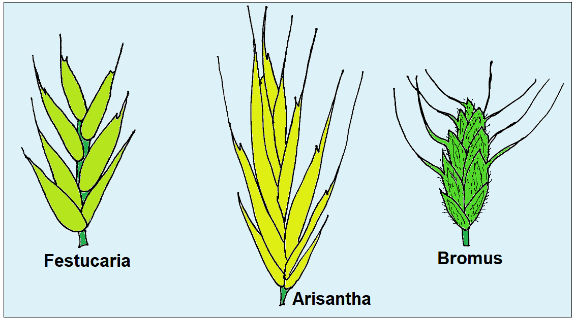 Bromus - Alcuni subgeneri